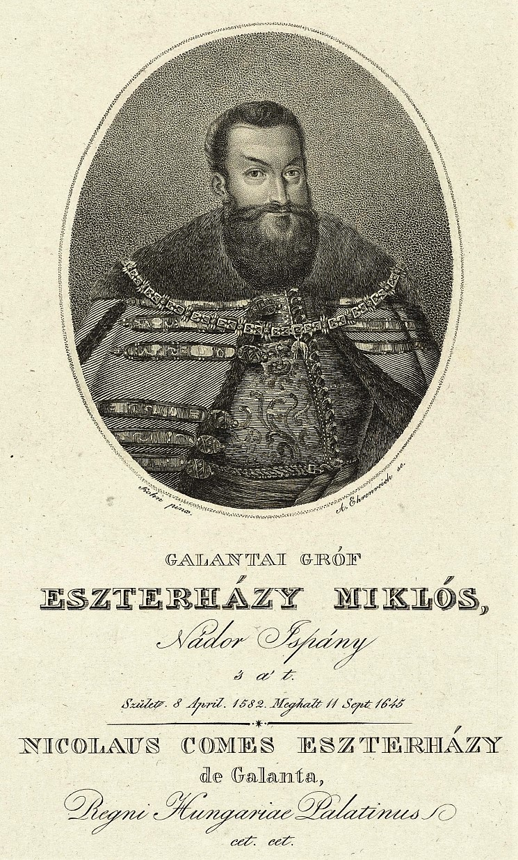 Esterházy-Galántha, Nikolaus Graf (1583 - 1645)